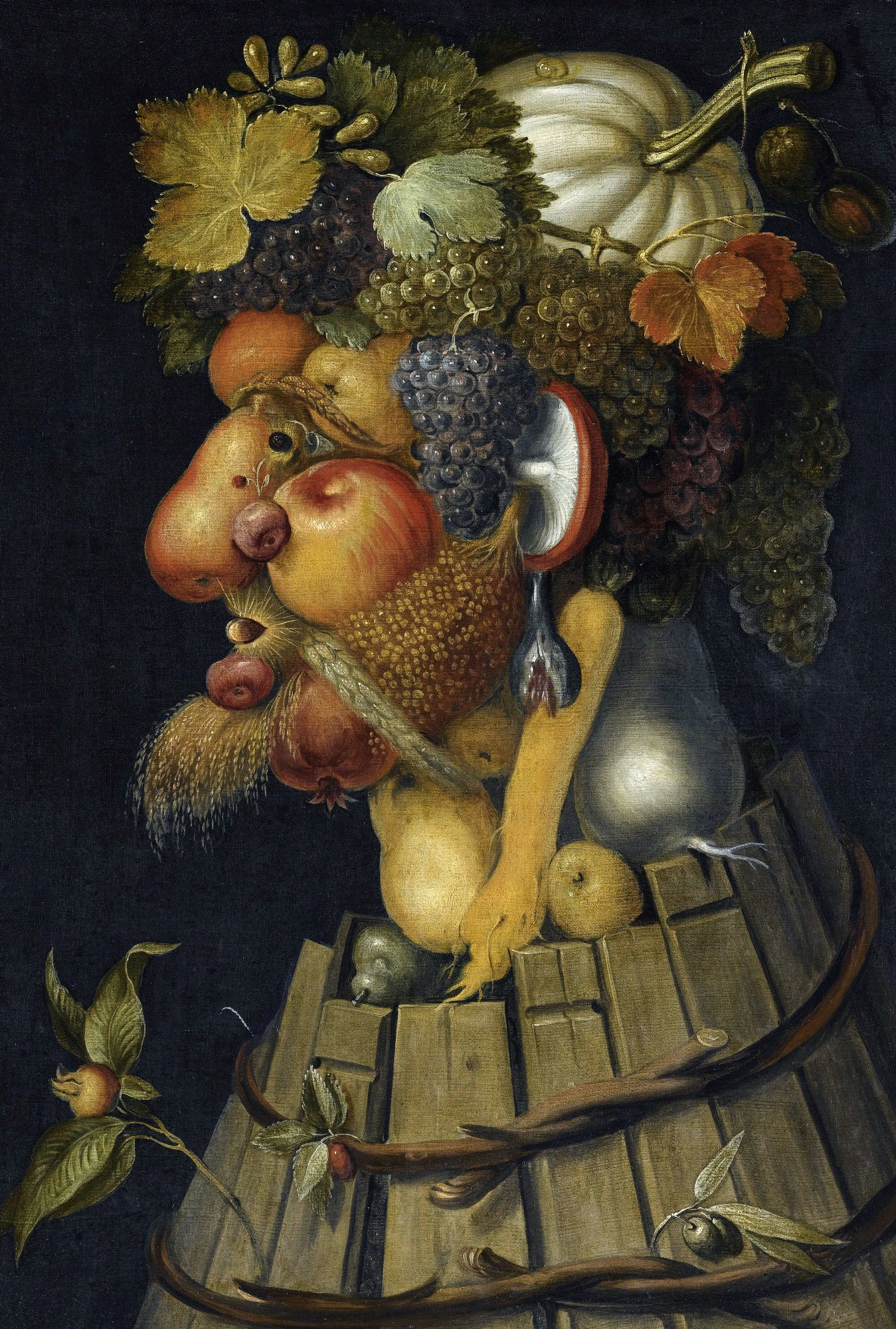 Autumnlabel QS:Len,"Autumn"